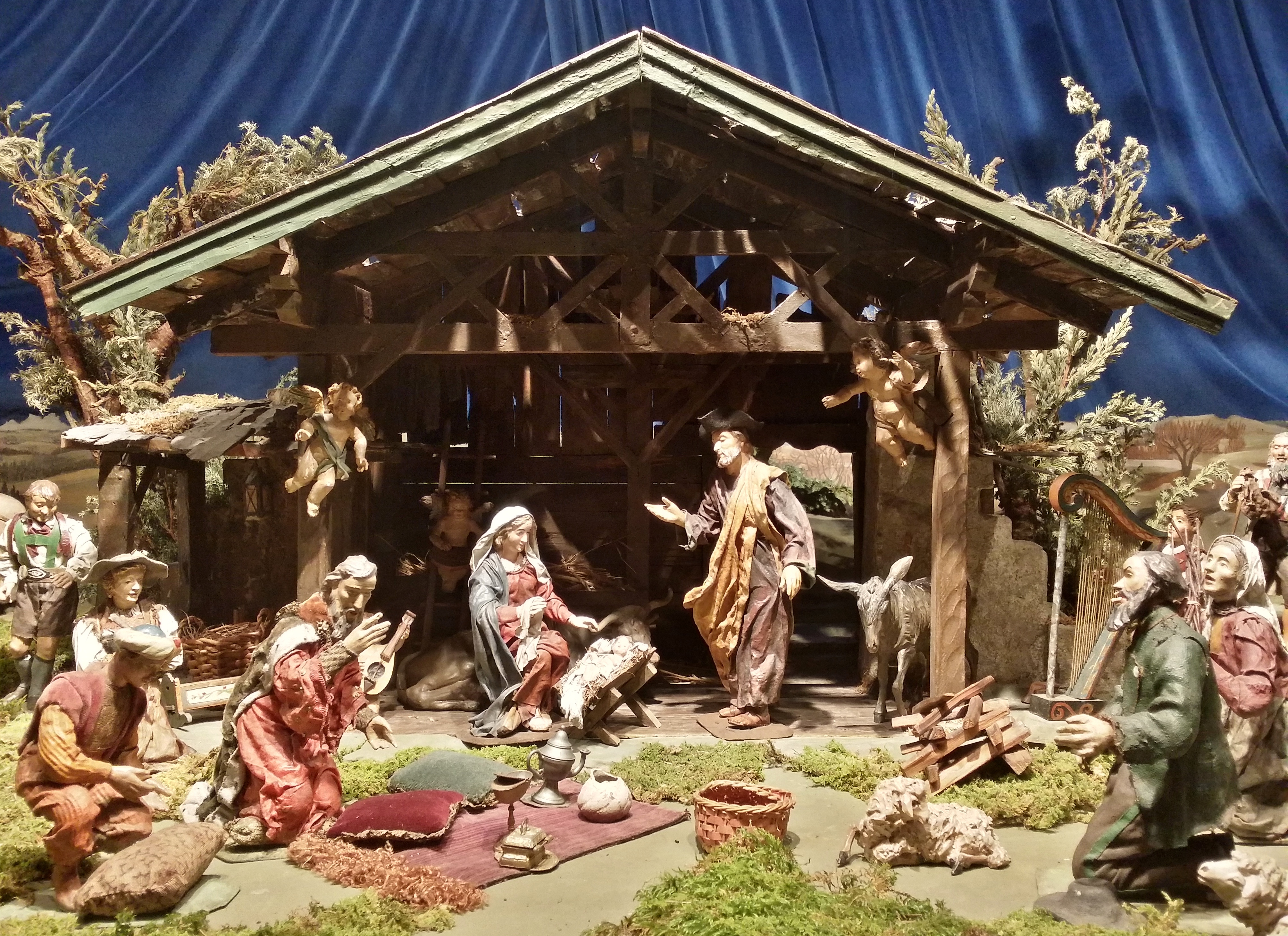 Münchner Stadtkrippe im Innenhof des Rathauses. Die altbairische Weihnachtskrippe wurde von dem, 1903 geborenen, Holzbildhauer Reinhold Zellner für den Christkindlmarkt gestaltet.